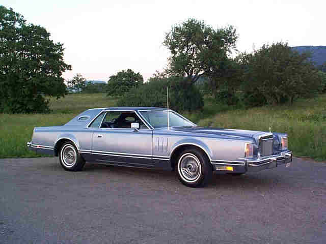 Dieses Motiv wurde in Mössingen-Belsen, Baden Württemberg (D) von Ingo Arndt aufgenommen.